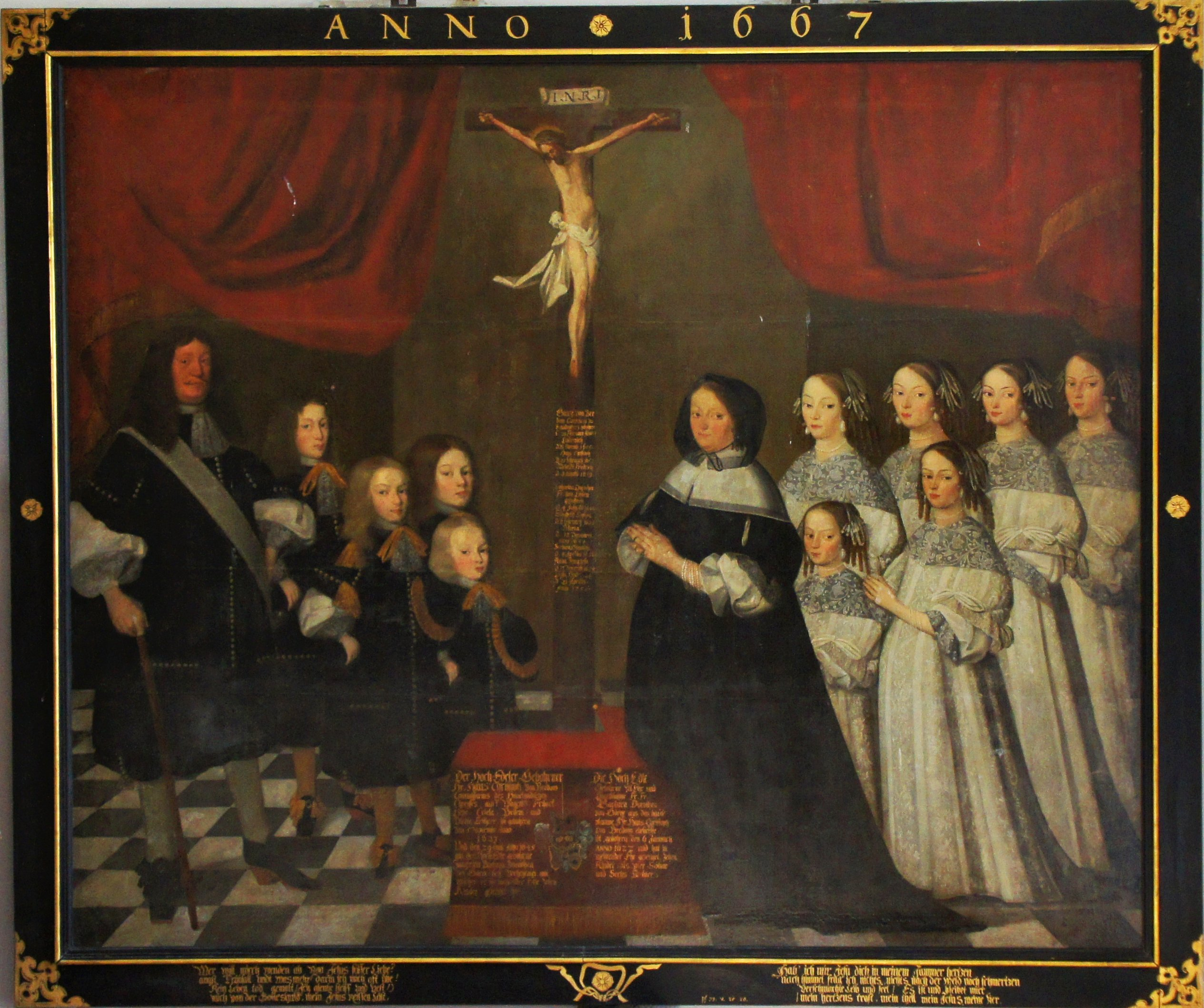 Votivgemälde des Johann Wilhelm von Bredow mit seiner Frau Barbara von Görne und seinen Kindern. Gemalt 1667.